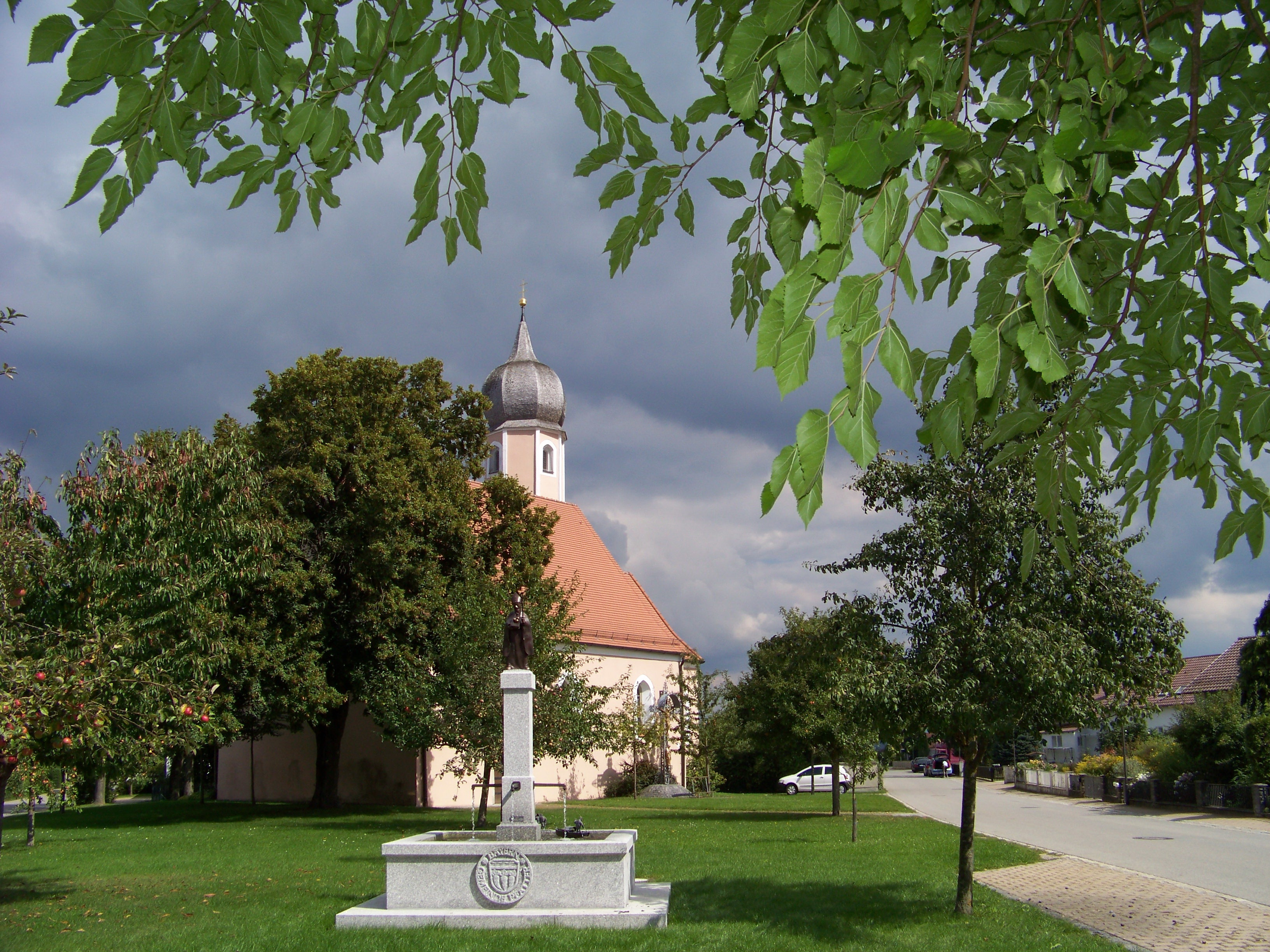 Pfatter. Katholische Nebenkirche St. Nikolaus, Saalbau mit eingezogenem Chor, Flankenturm mit Zwiebelhaube und Putzgliederungen, um 1600; mit Ausstattung.